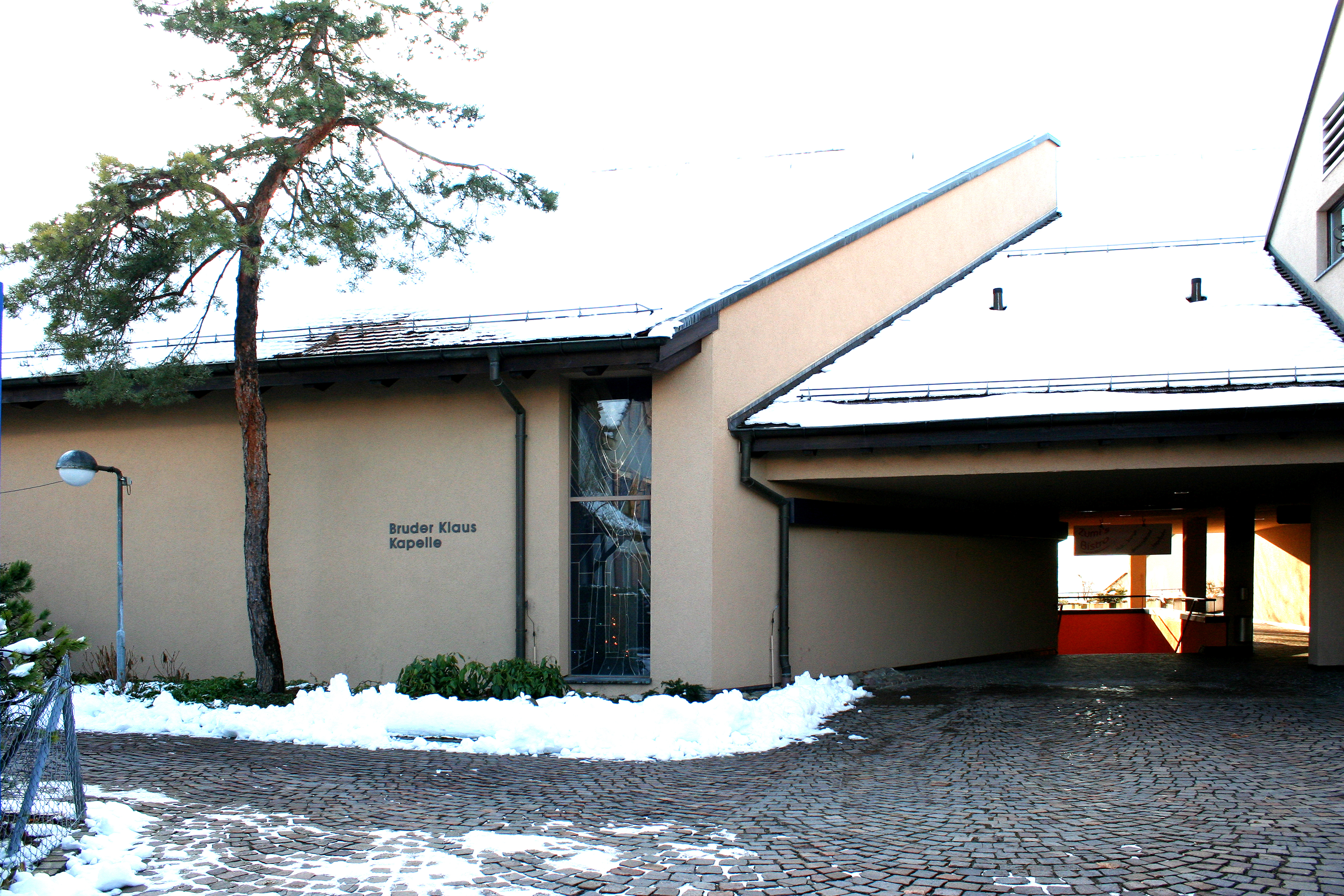 Römisch-katholische Kirche Bruder Klaus Zumikon aussen